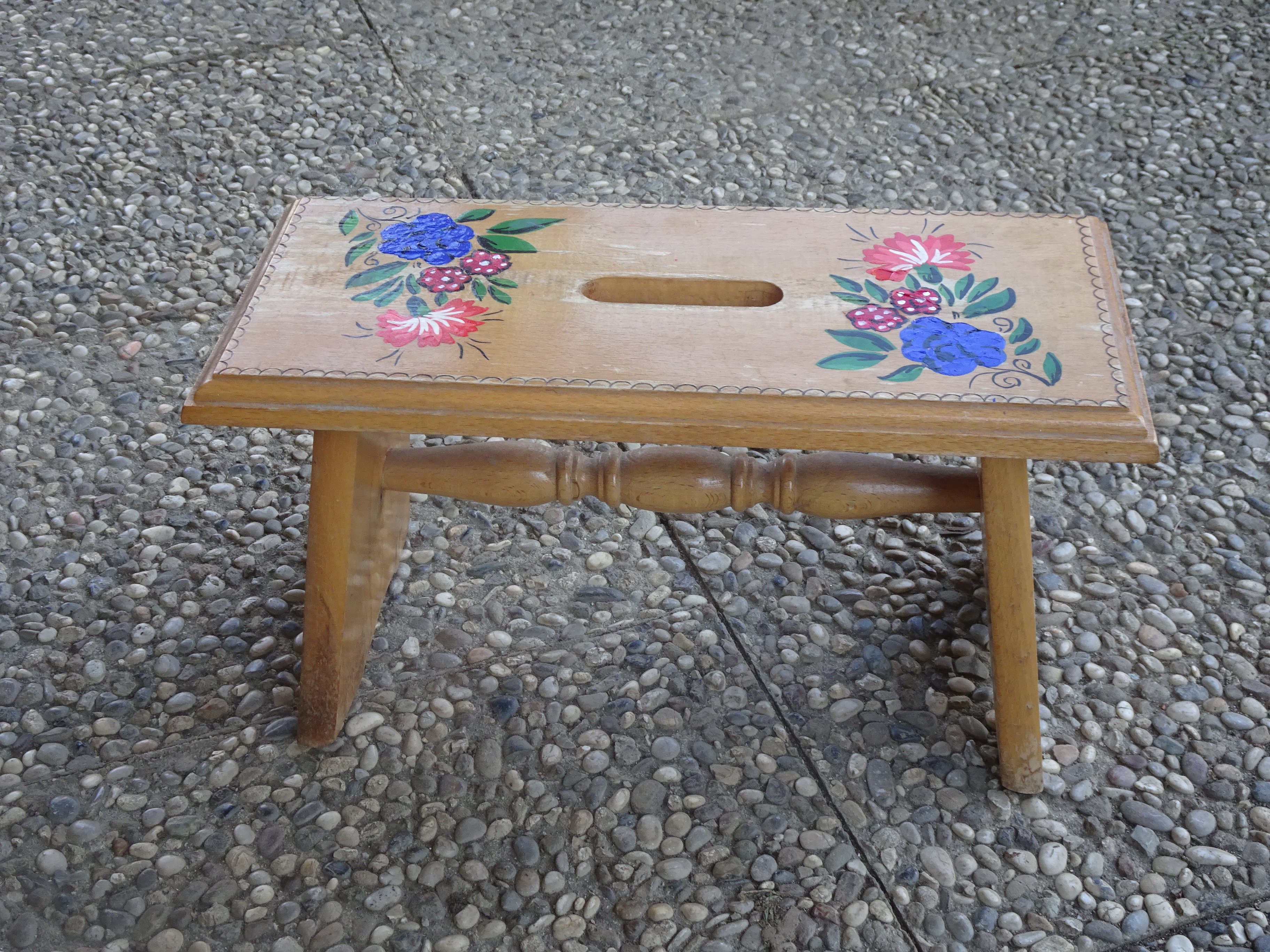 pručka